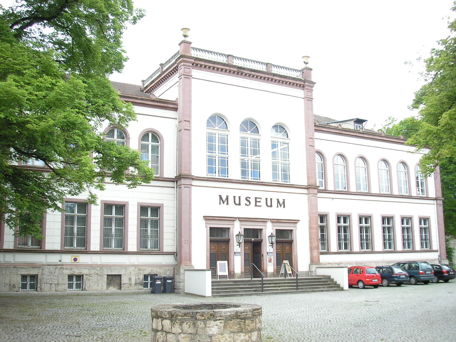 Das Museum am Lindenbühl in Mühlhausen/Thüringen.